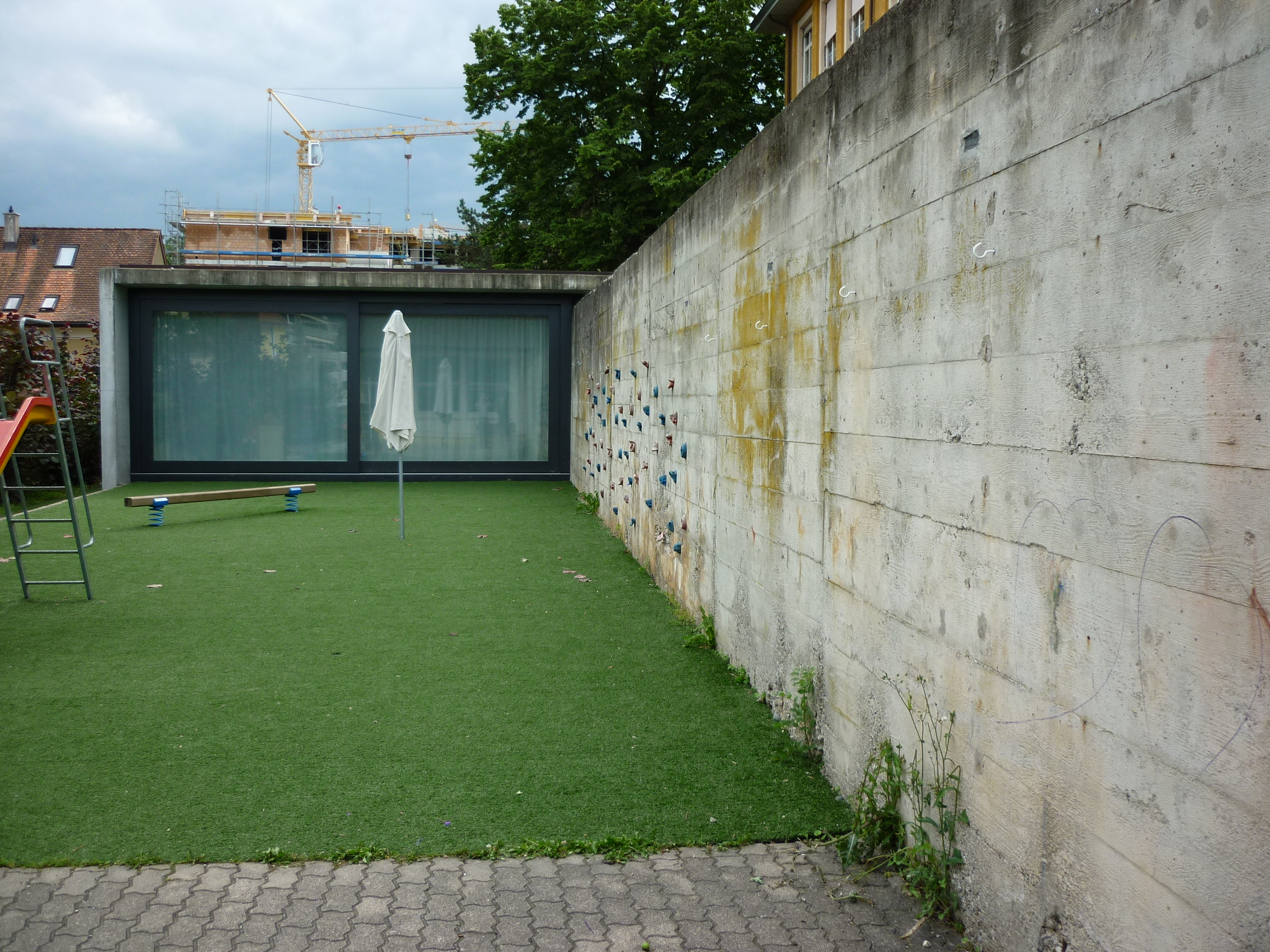 Festungsmauer, Festung Dietikon ZH, Schweiz